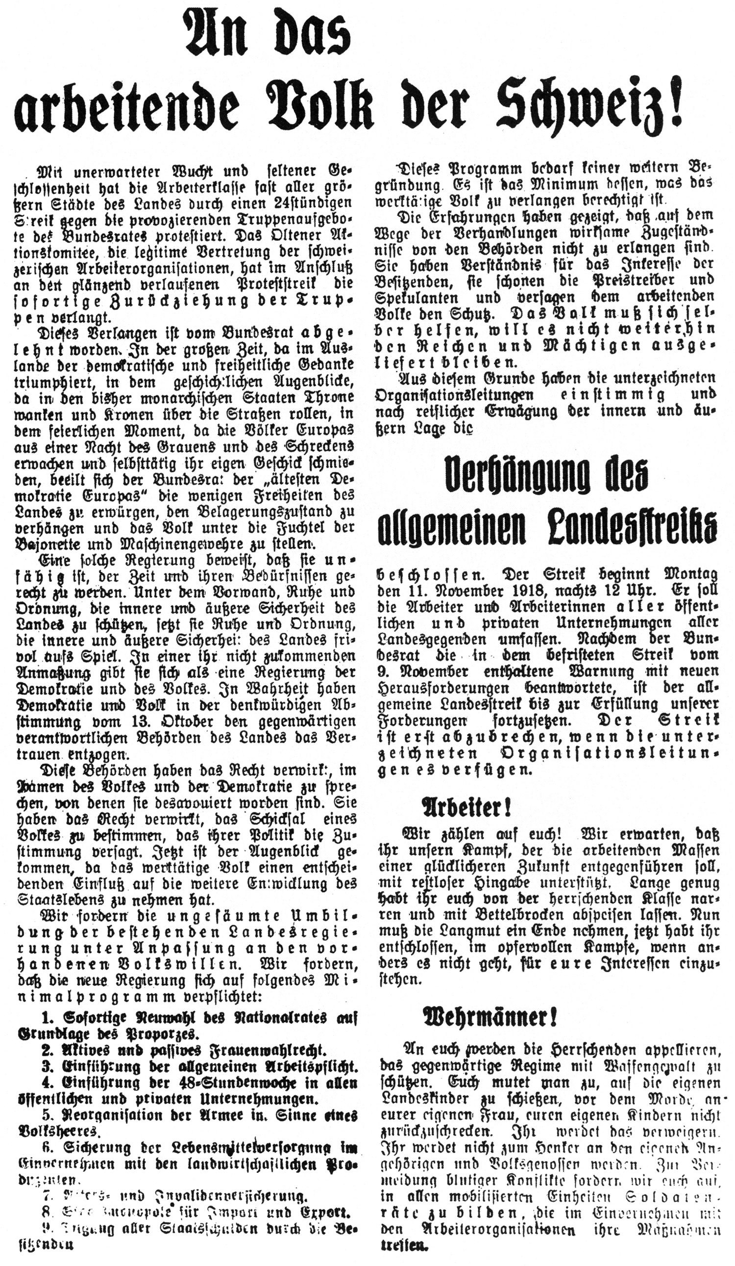 Aufruf zum unbefristeten Landesstreik vom 11. November 1918. Vorderseite eines Flugblatts aus dem Staatsarchiv Zürich